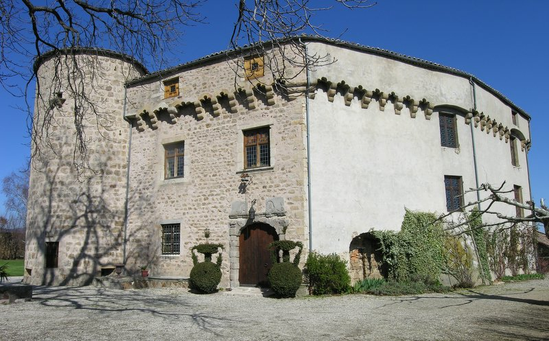 château de Lupé, façades sud et est